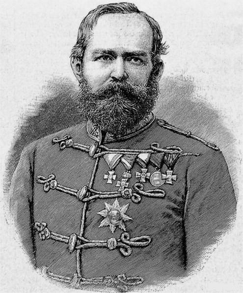 Leopold Freiherr von Edelsheim-Gyulai (1826-1893) comandante del 10º Reggimento Ussari "Federico Guglielmo III Re di Prussia".